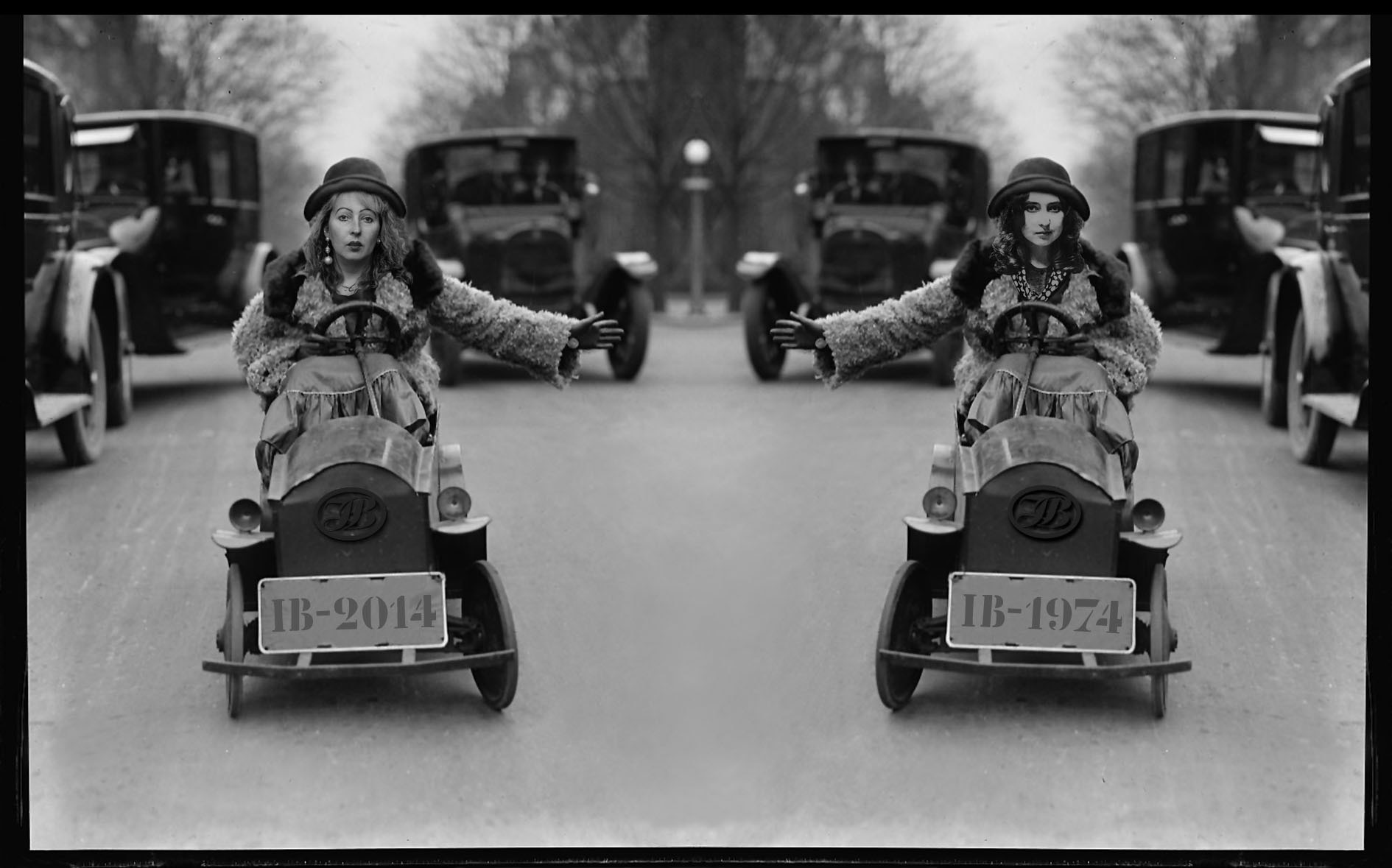 Retrospectiva Ilona Bruvere